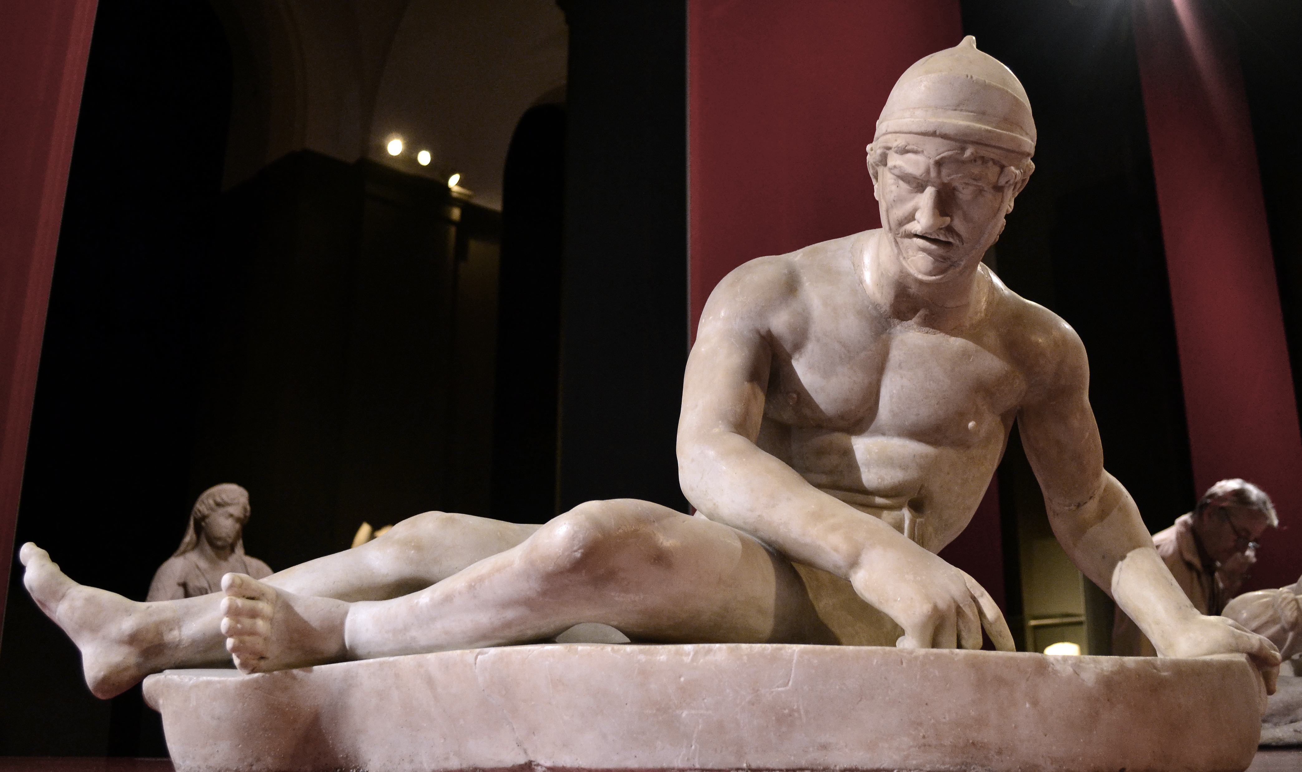 Römische Mamorkopie (trajanisch-hadrianisch) einer hellenistisches Skulptur (um 150 v.Chr.); Römische Mamorkopie (trajanisch-hadrianisch) eines griechischen Bronzeoriginals (um 150 v.Chr.). Mamor. FO: Rom, 1514. Leihgabe des Museo Archeologico Nazionale, Napoli.